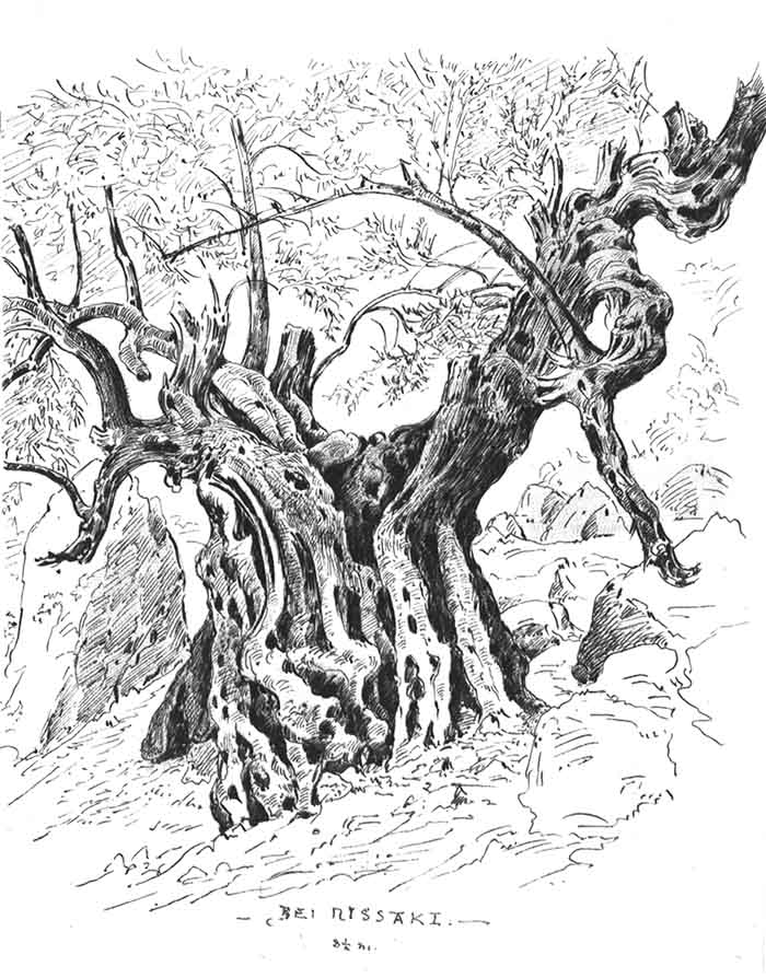 Ελιά, σχέδιο του Λουδοβίκου Σαλβατόρ, Αρχιδούκα της Αυστρίας, από το βιβλίο του Sommertage auf Ithaka (Ημέρες καλοκαιριού στην Ιθάκη), 1903, σελ. 29